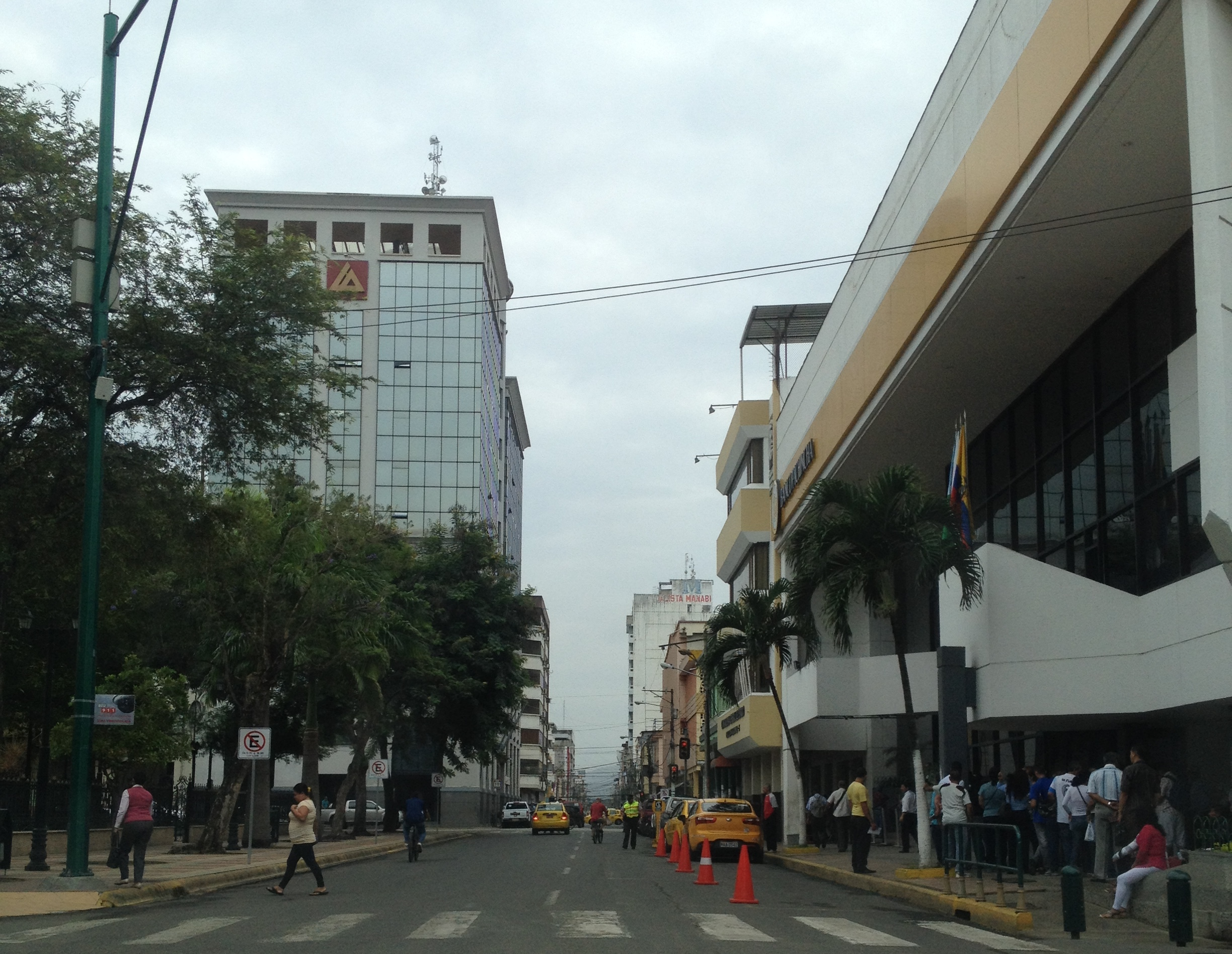 Calle Olmedo a la altura del parque central.